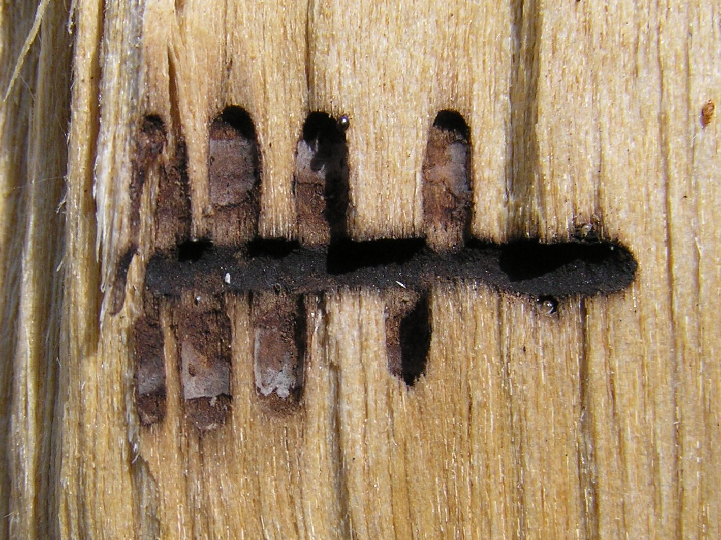 Xyloterus signatus, Drwalnik znaczony, Polska